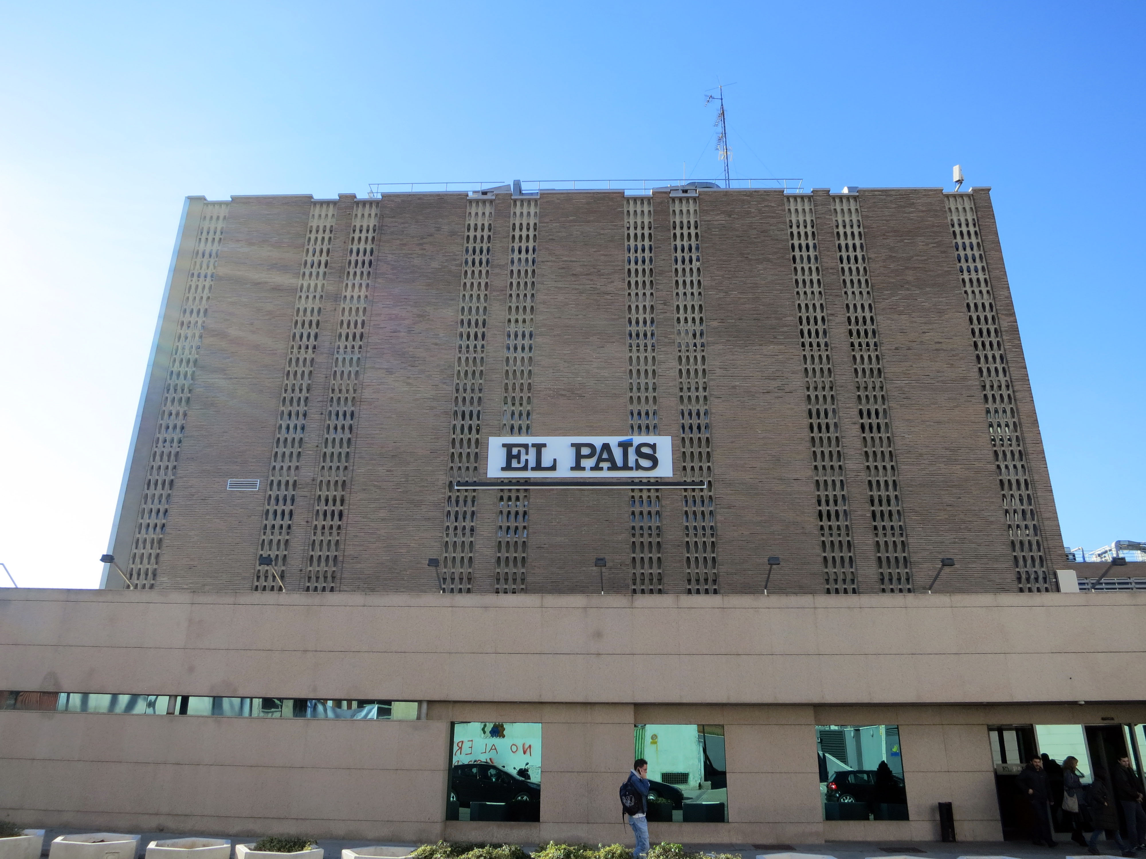 Sede de El País en la calle Miguel Yuste de Madrid